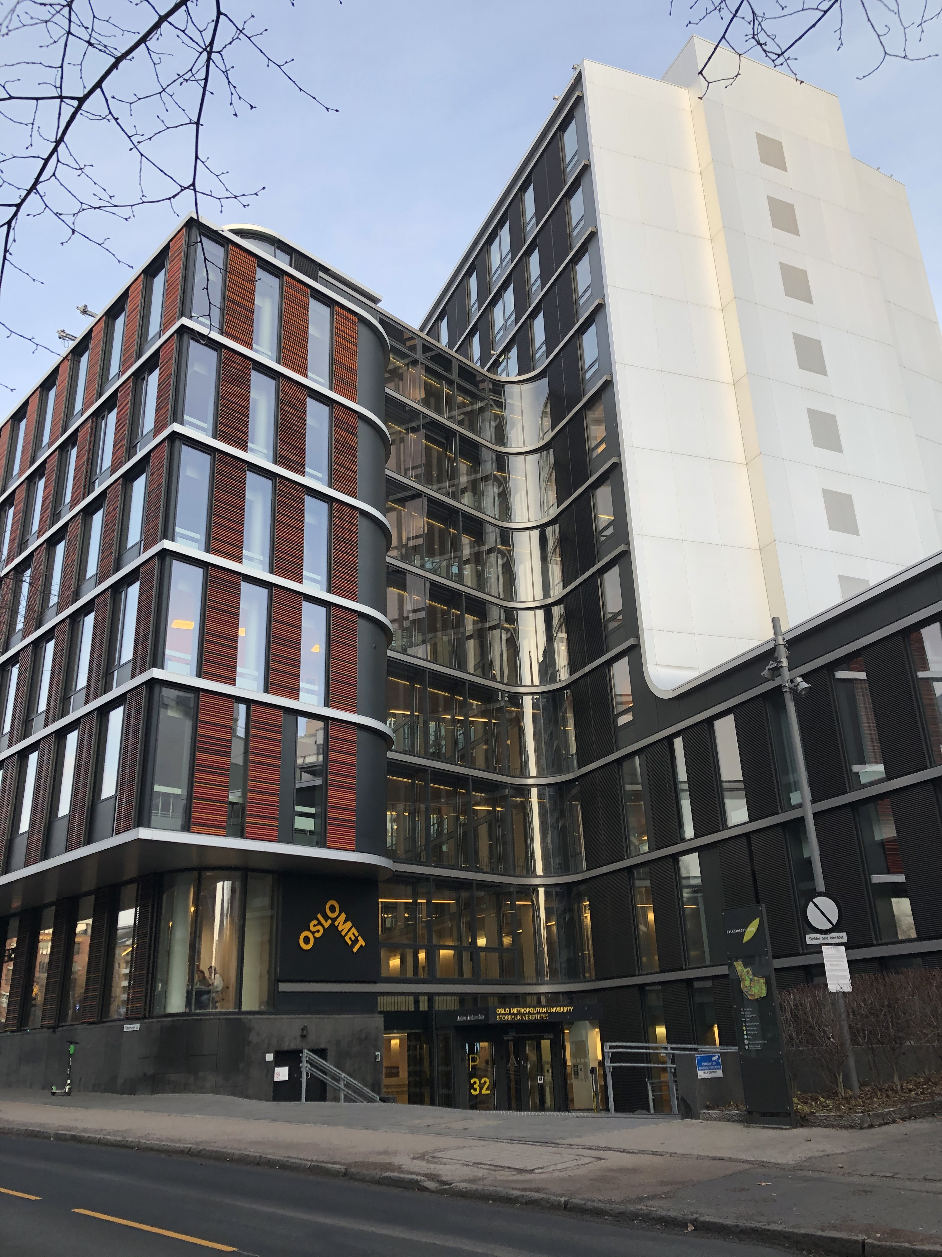 Pilestredet 32 - Pilestredet park 41, Oslo